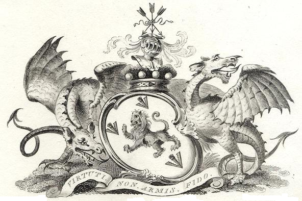 Wappen des Earl of Wilton